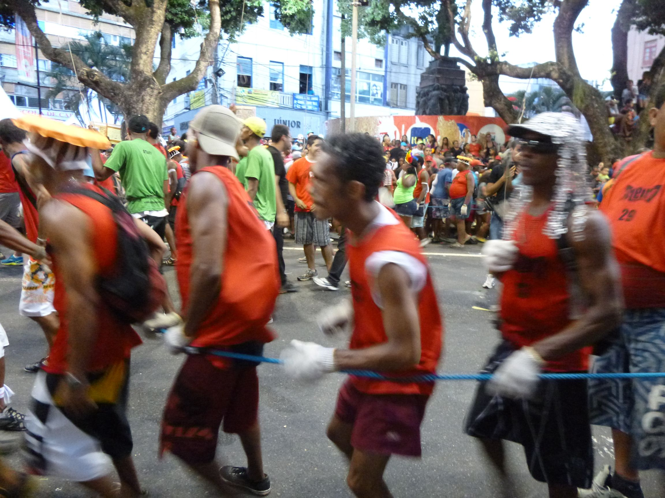 Cordões, Seilhalter Karneval Salvador Bahia